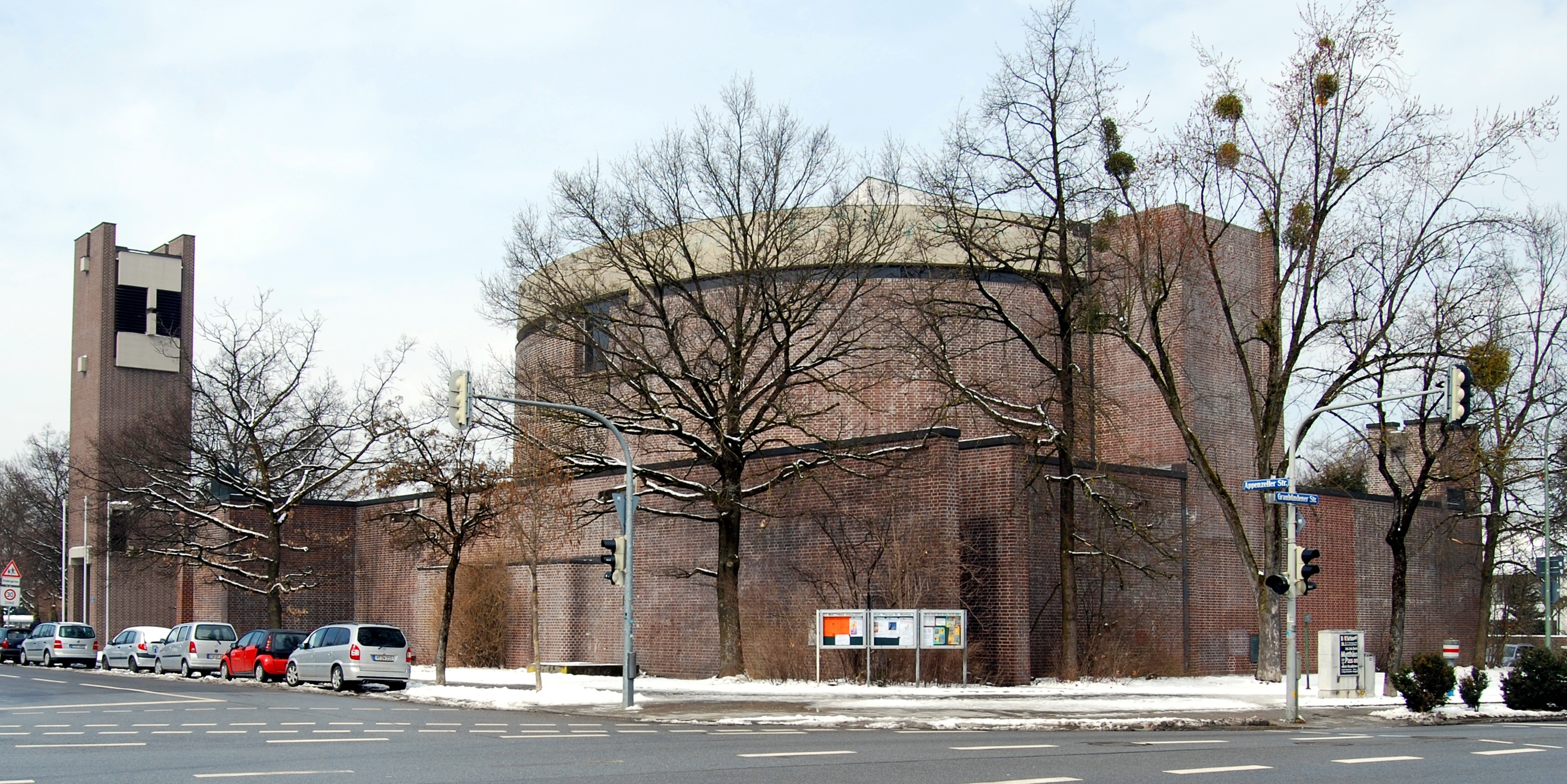 Kirchengebäude St. Matthias in München-Fürstenried